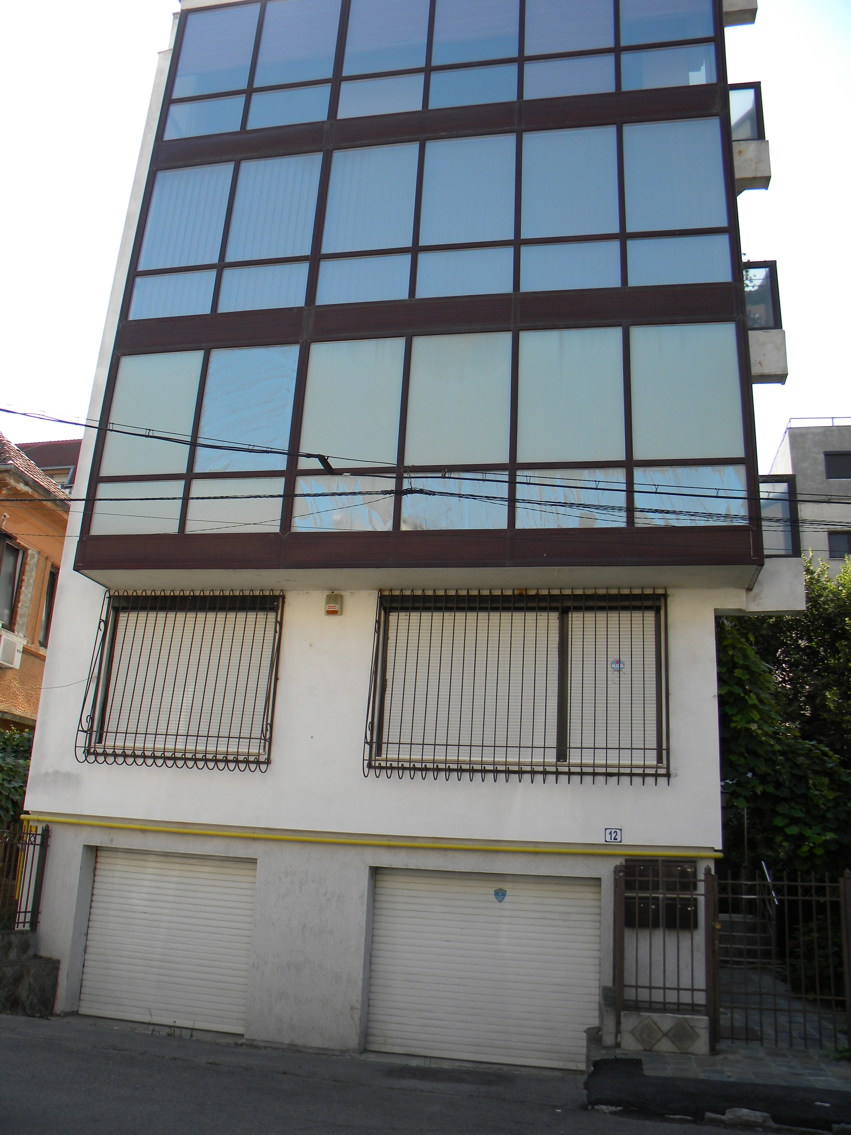 Bucuresti, Romania, Imobilul nr. 12 de pe Str. Naum Ramniceanu; B-II-m-B-19531